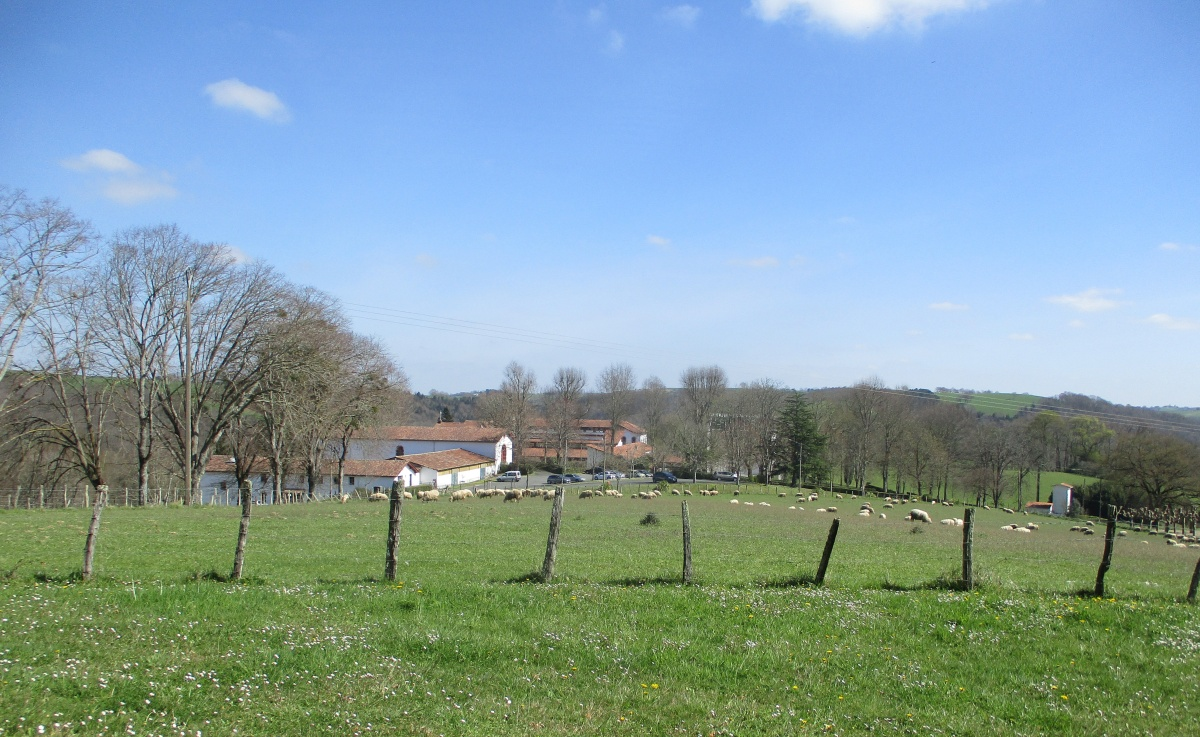 L'abbaye de Belloc vue d'une colline proche. Facade ouest